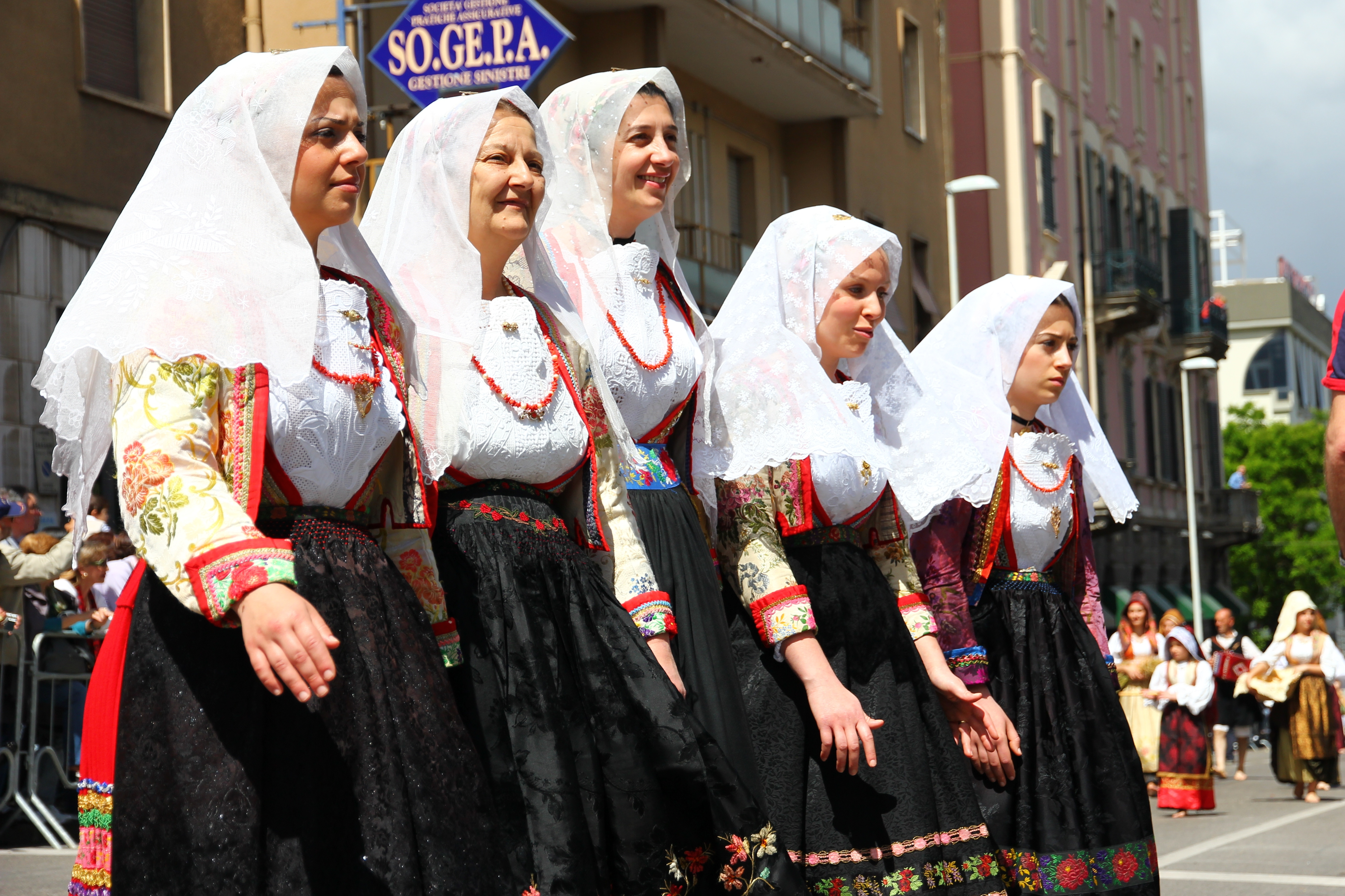 Cavalcata Sarda 2013 (Sassari)